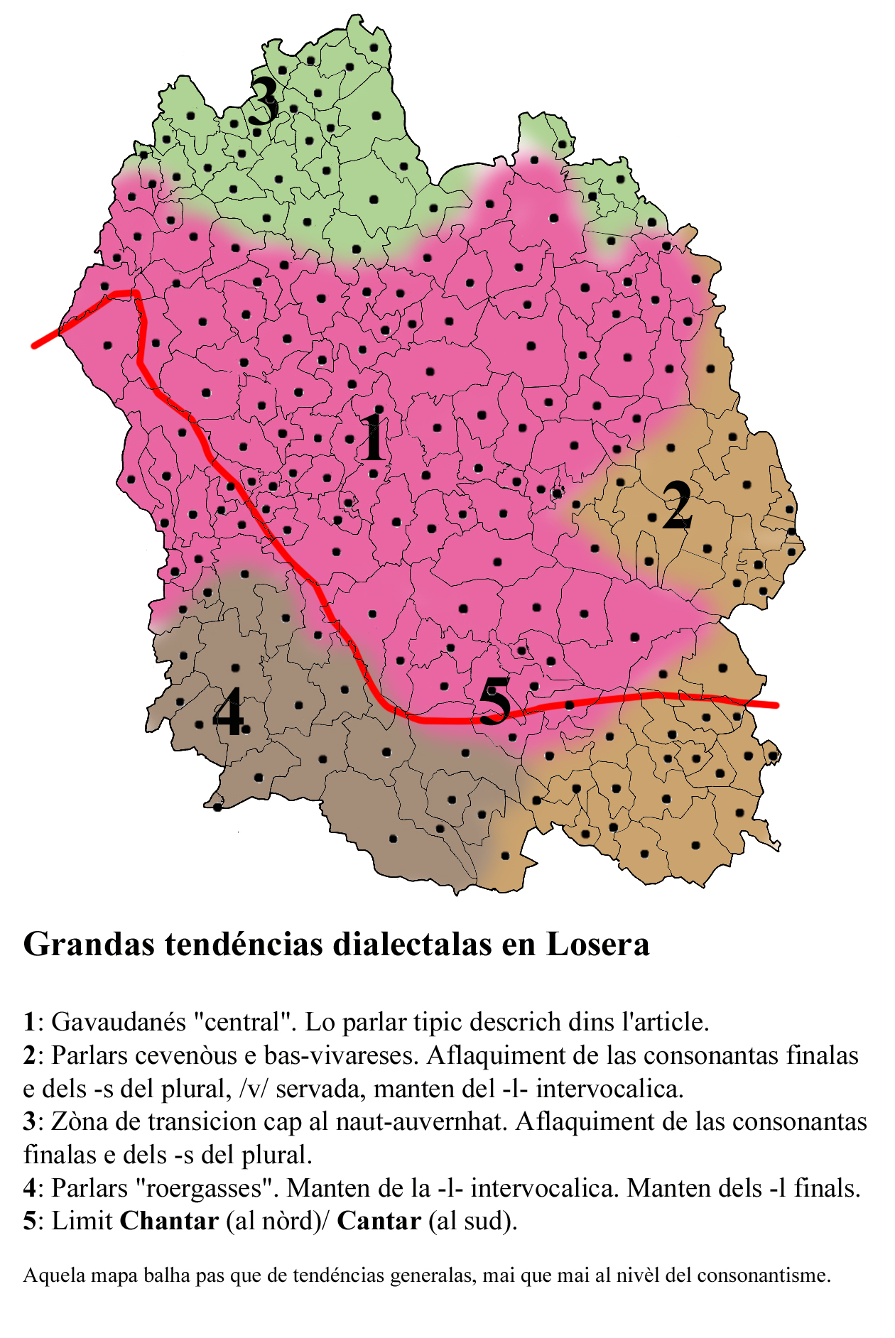 Tendéncias dialectalas en Gavaudanés Dialect (tendencies) in the gavaudan dialect of occitan.